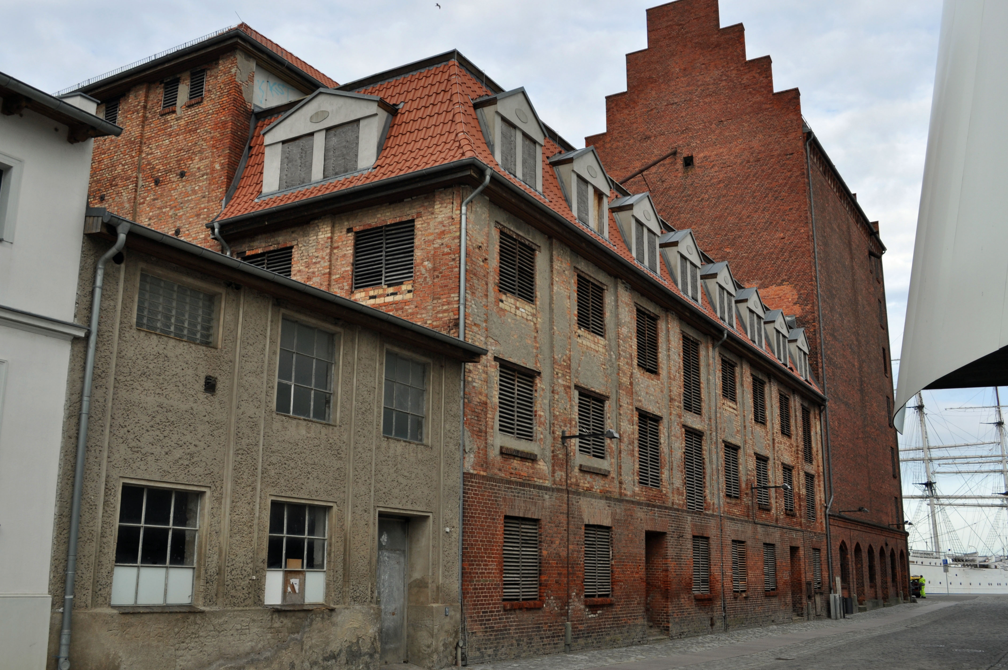 Gebäude bzw. Gebäudedetail in Stralsund. Straße und Hausnummer siehe Dateiname.